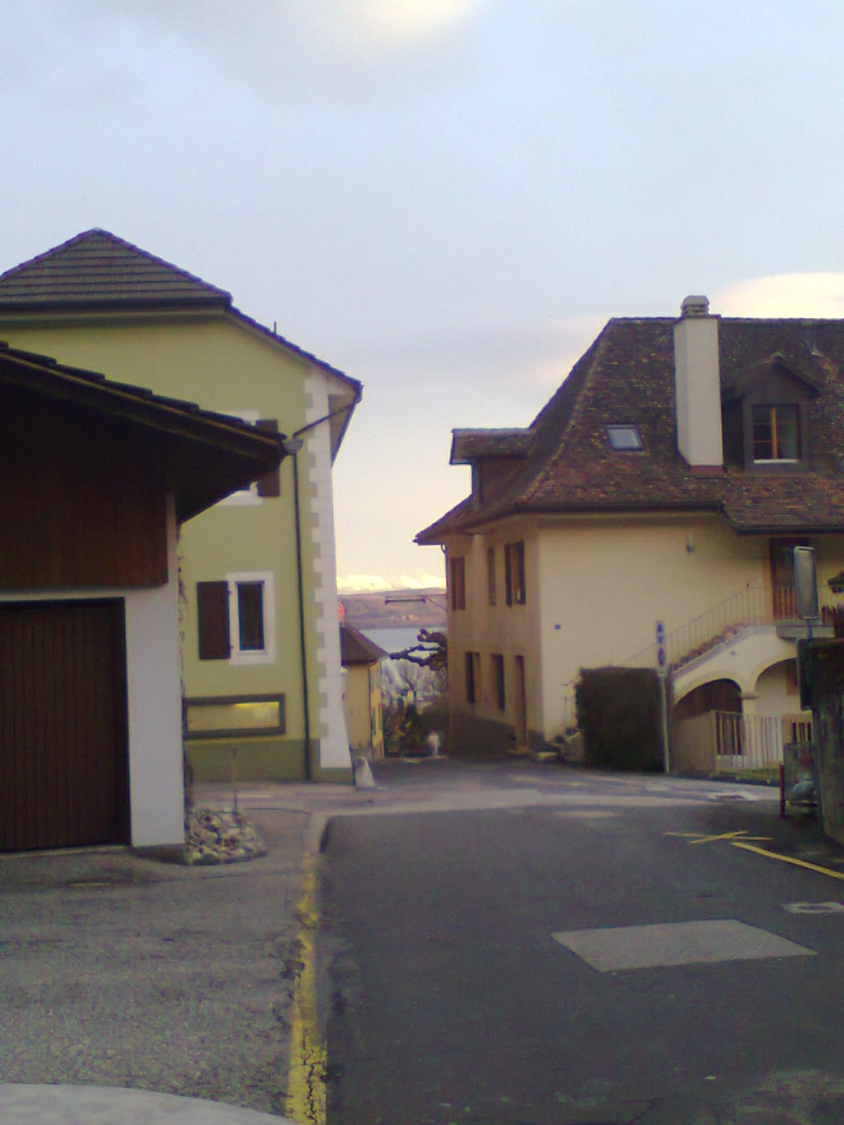 Saint-aubin-sauges 2014